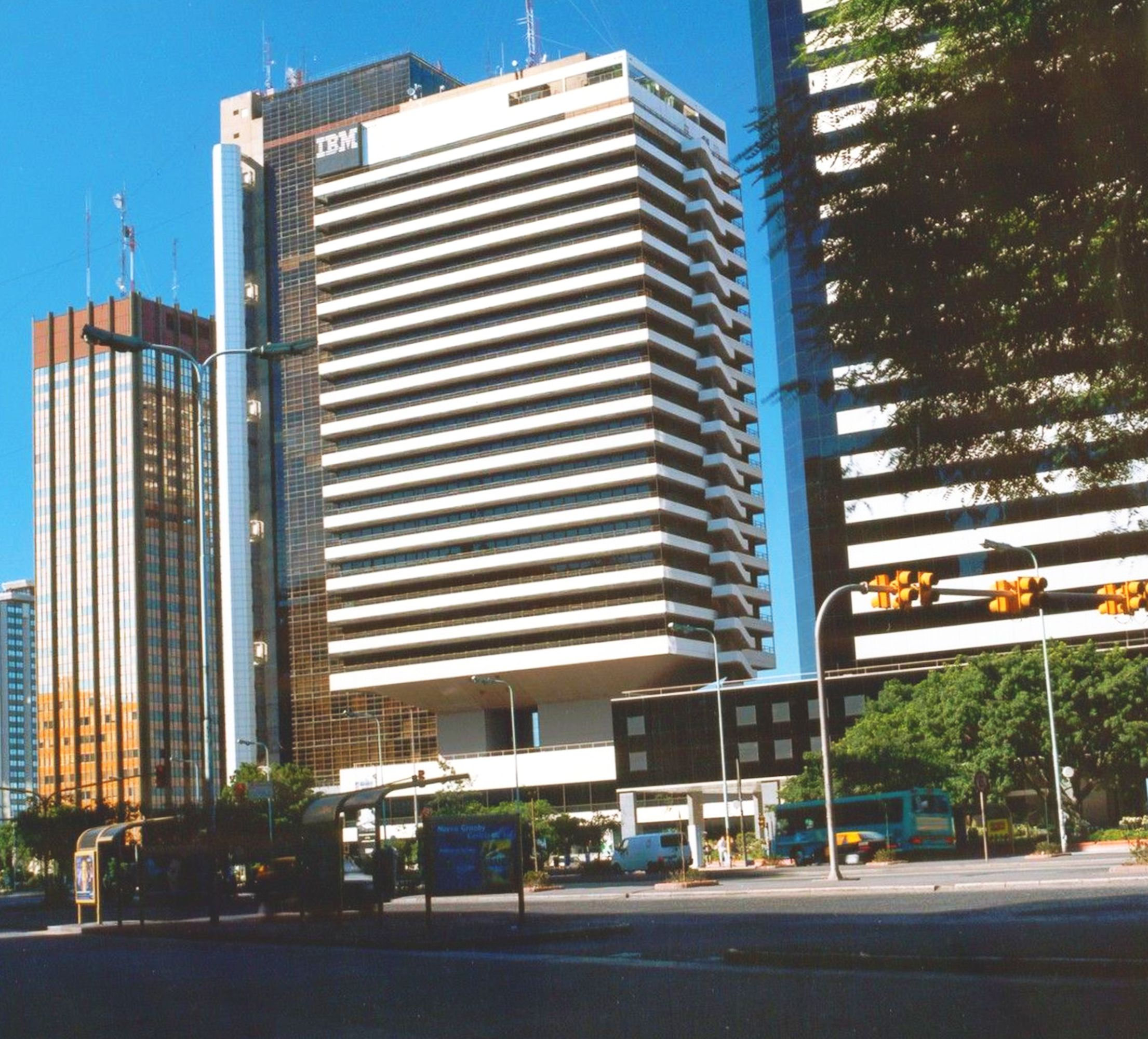 Torre IBM en Buenos Aires